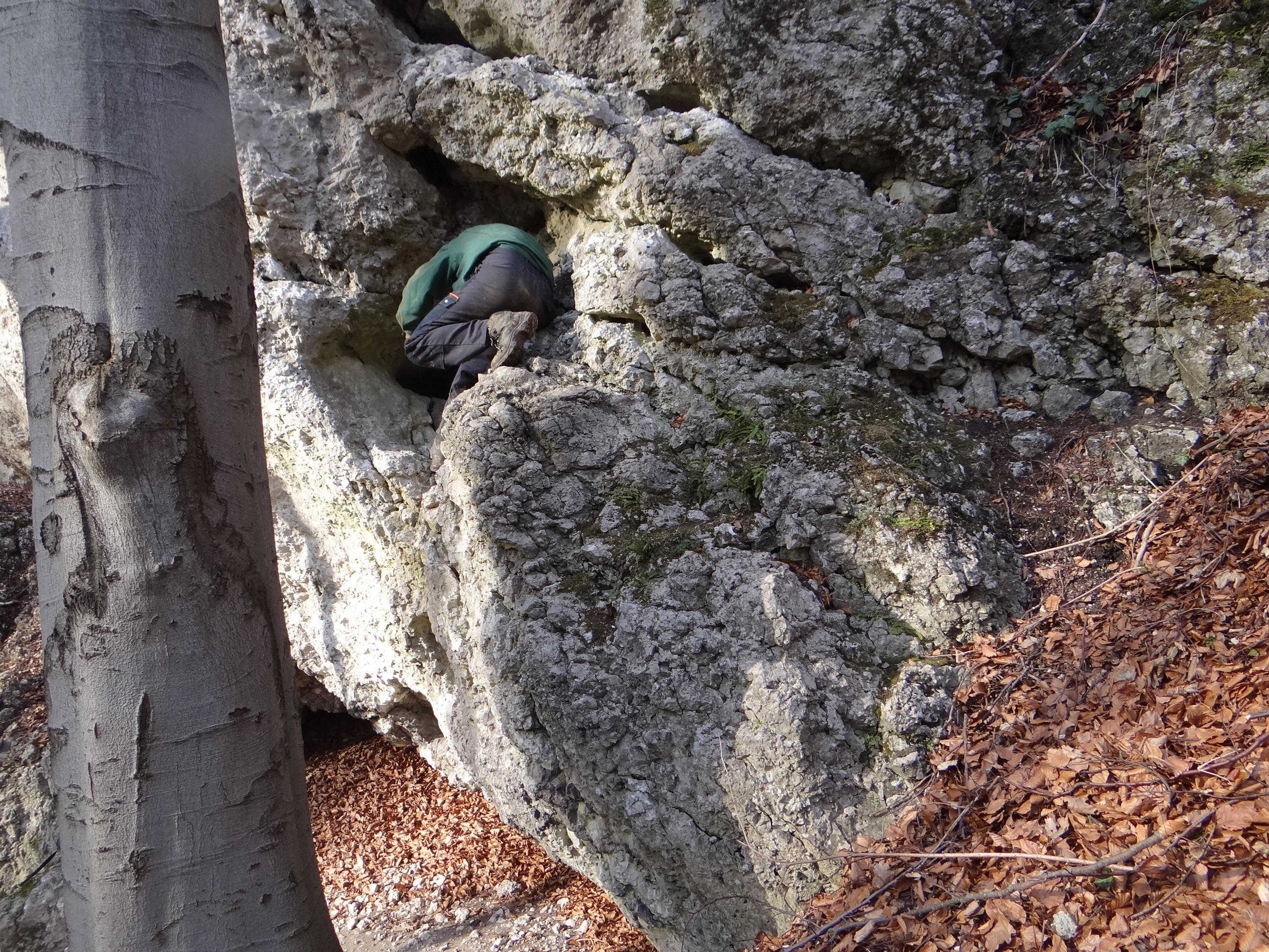 Schronisko Żarskie II w Dolinie Racławki